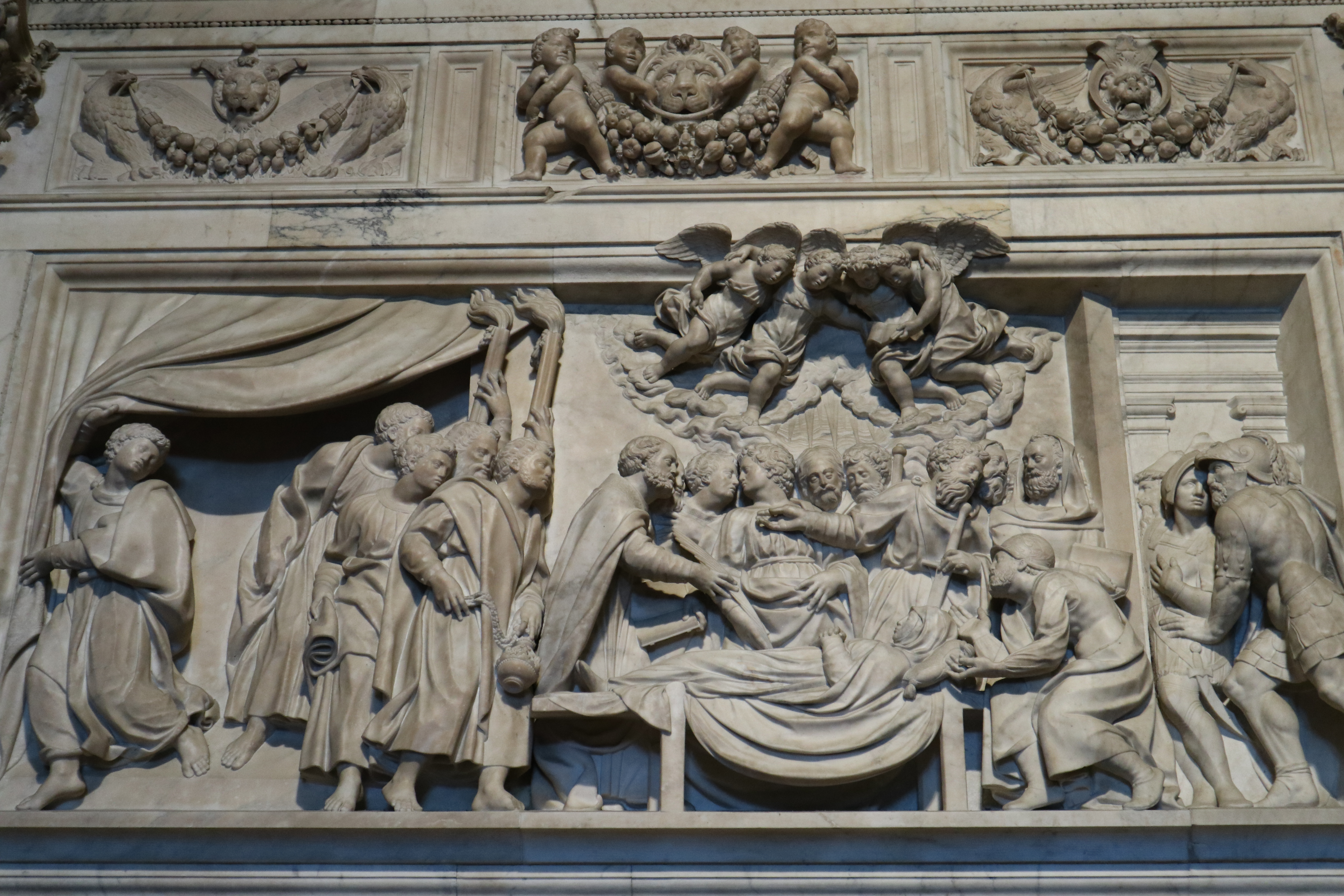 Santa Casa: "Transito della Vergine", Domenico Aima su disegno di Donato Bramante.